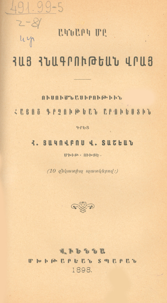 Страница из книги А. Ташяна «Обзор армянской палеографии»